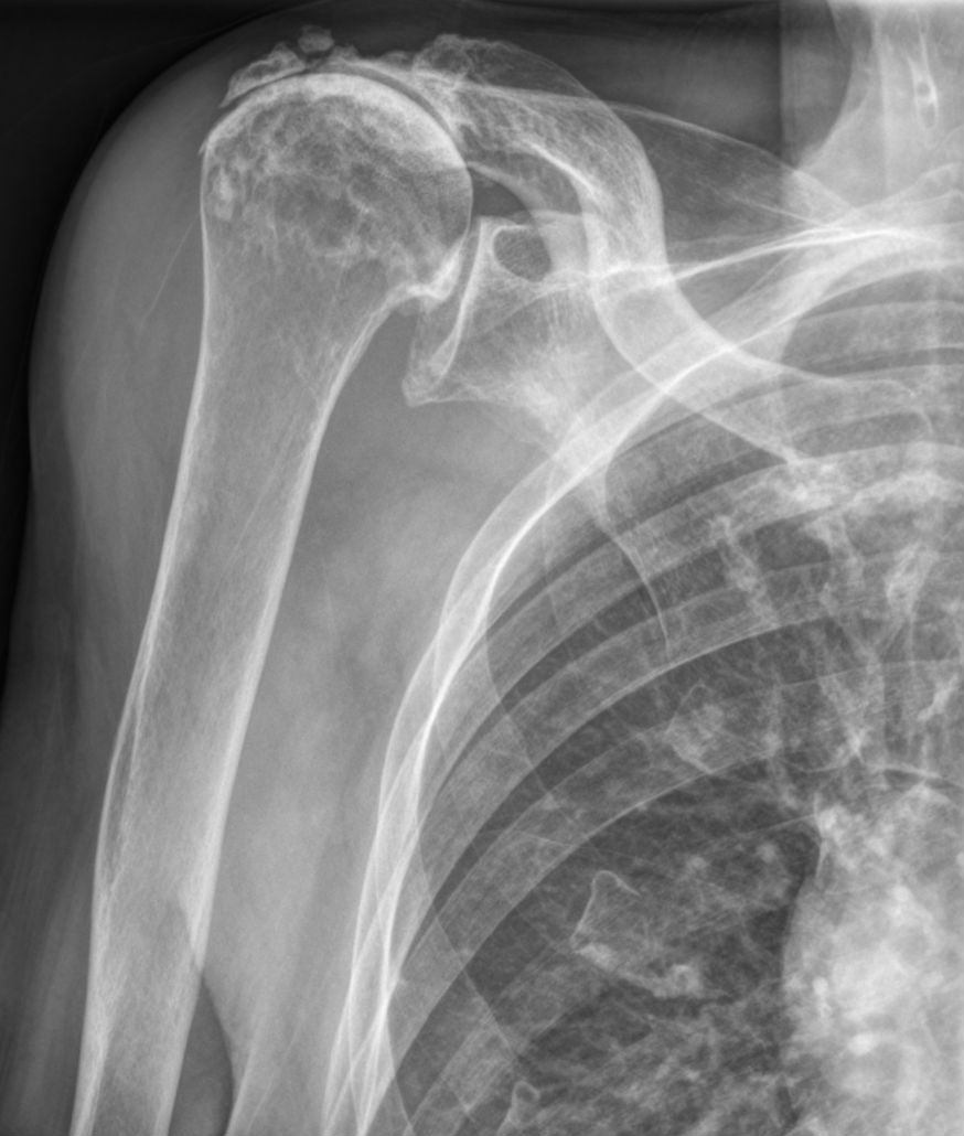 Alte Läsion der Rotatorenmanschette mit praktisch aufgehobenem Subacromialraum, Humeruskopfhochstand und Ausbildung eines Pseudogelenks / Neogelenks zwischen Humeruskopf und Acromion. Kein seltener Befund.